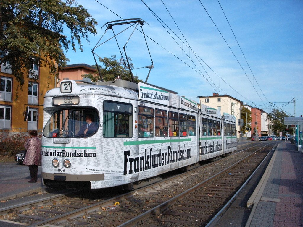 VGF Tramcar N 808 at Mönchhofstrasse, Frankfurt am Main, October 23, 2003. Photographed and uploaded by Philipp Gross. VGF-Straßenbahnwagen N 808 an der Haltestelle Mönchhofstraße, Frankfurt am Main, 23. Oktober 2003. Fotografiert und hochgeladen von Philipp Gross.